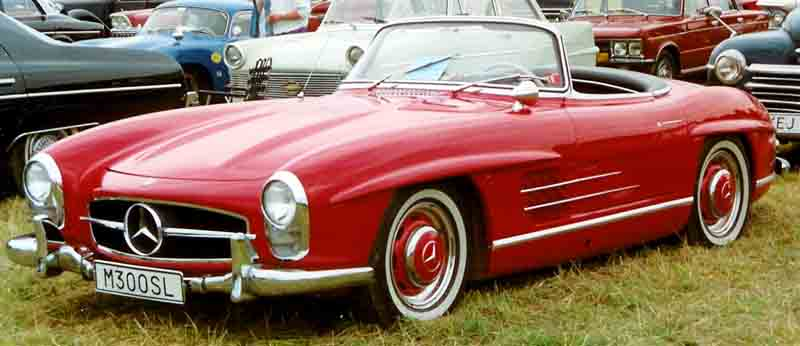 Mercedes-Benz 300SL Roadster